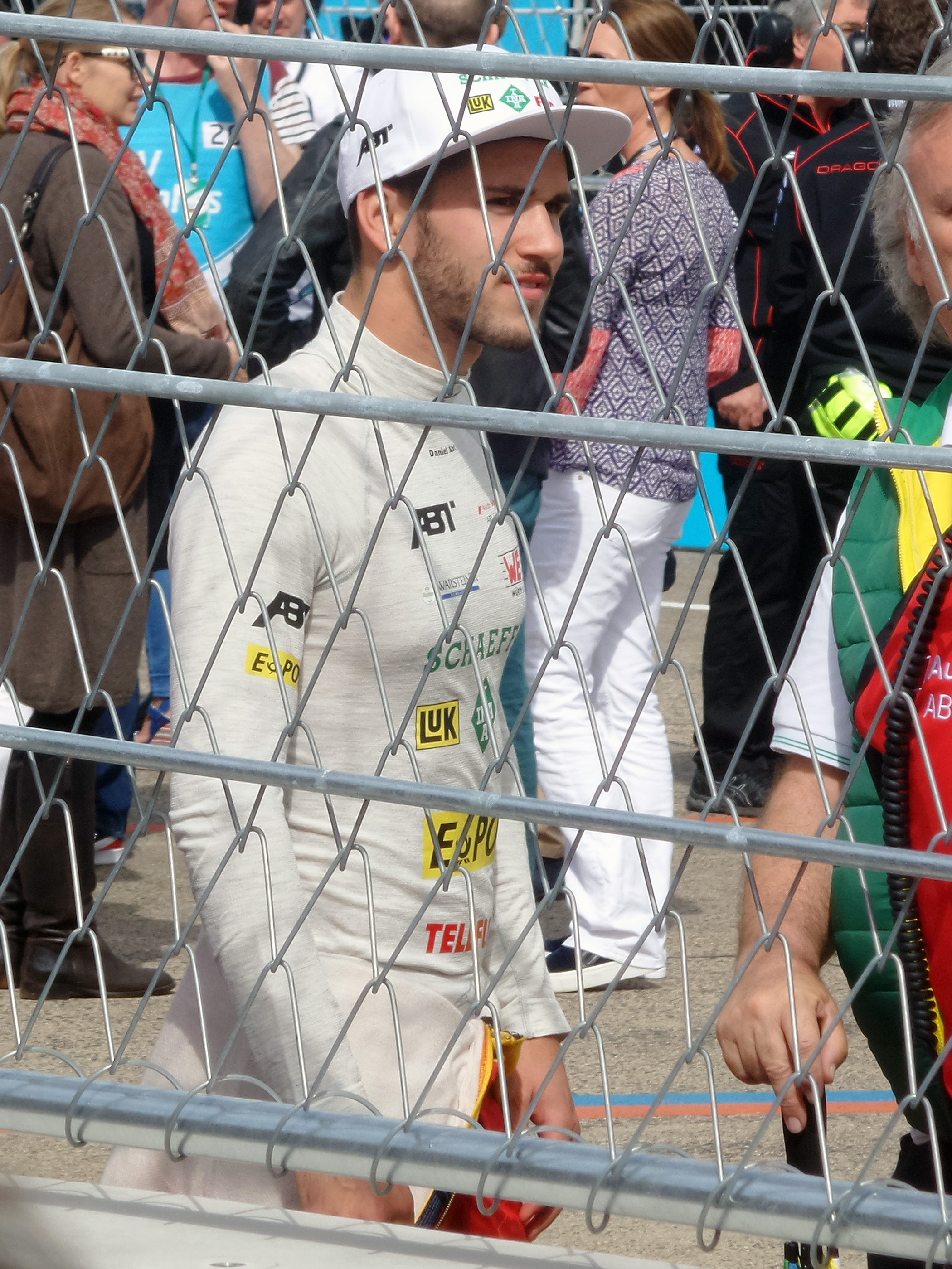 Daniel Abt in der Startaufstellung vor dem ePrix von Berlin 2015